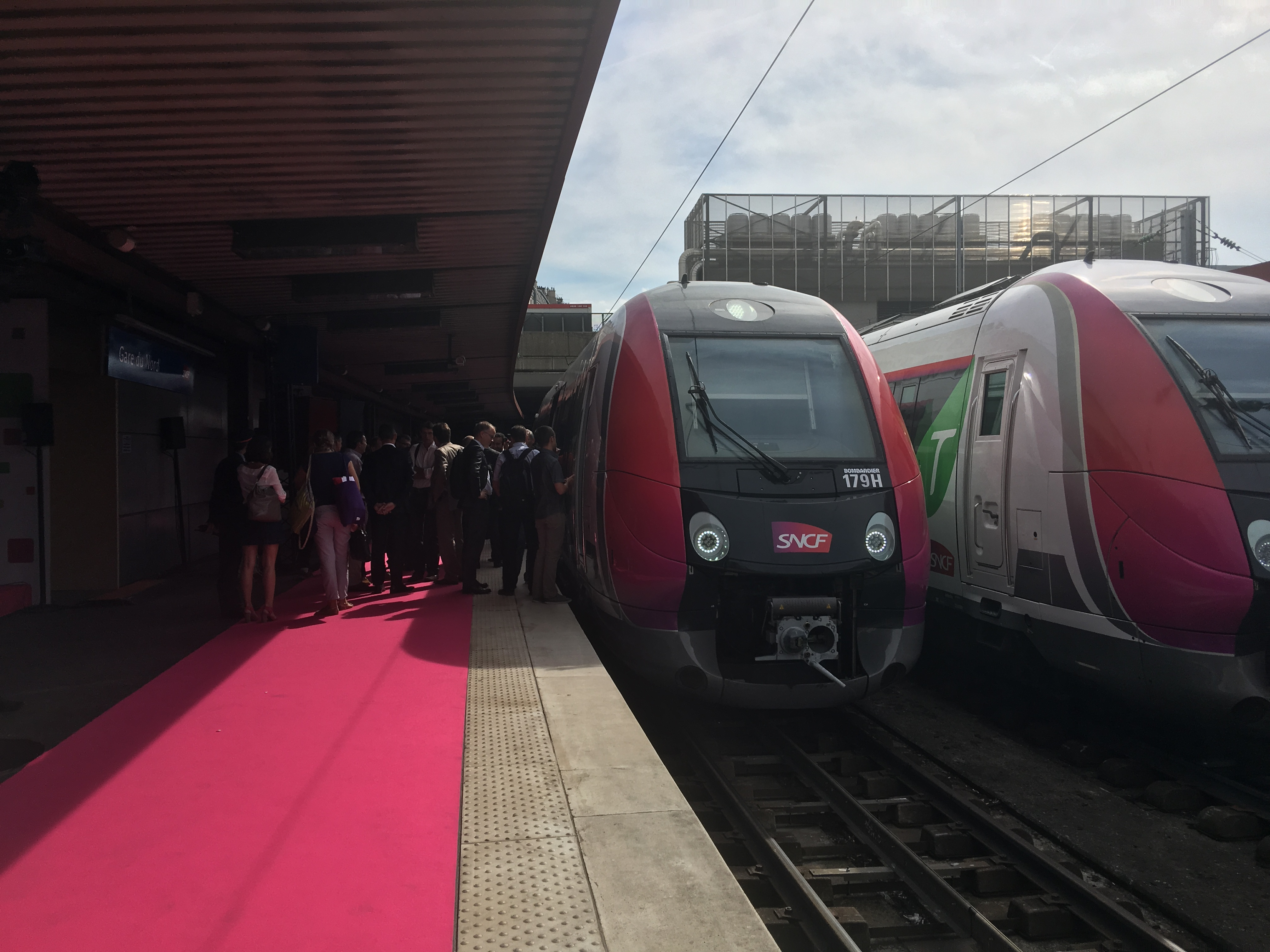 Le Transilien K PAVE01 n°121551 (Paris Nord 16h08 - Crépy en Valois 16h56) est prêt au départ de Paris Nord Surface, exceptionnellement à la voie 36 : en effet, il s'agit de la première rame Z 50000 à circuler commercialement sur la ligne K.